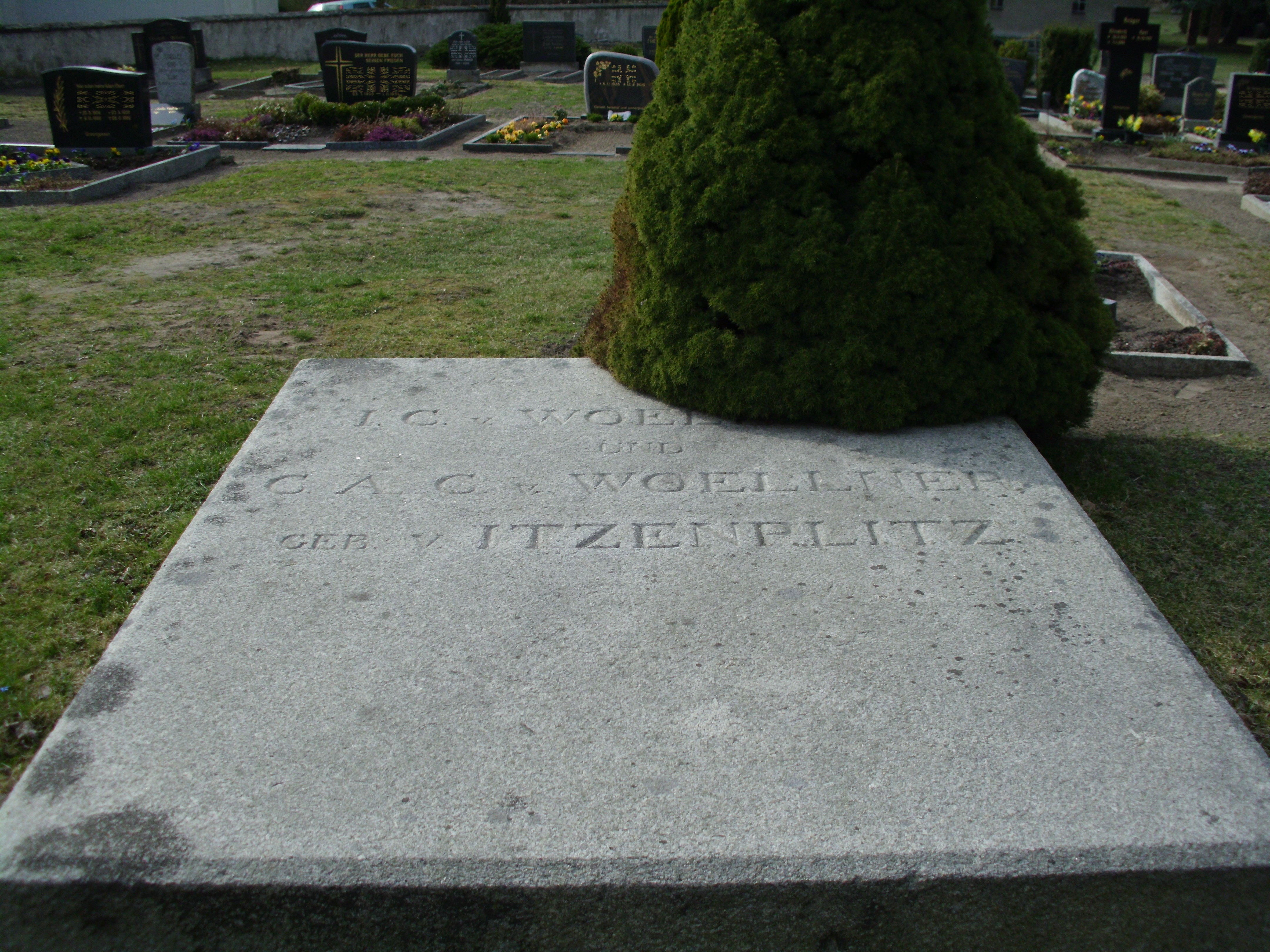 Grabstätte von Johann Christoph von Woellner (1732-1800), preußischer Pastor und Staatsmann und dessen Ehefrau Charlotte Amalie Elisabeth von Itzenplitz (1742–1801), in Groß Rietz bei Beeskow, Brandenburg